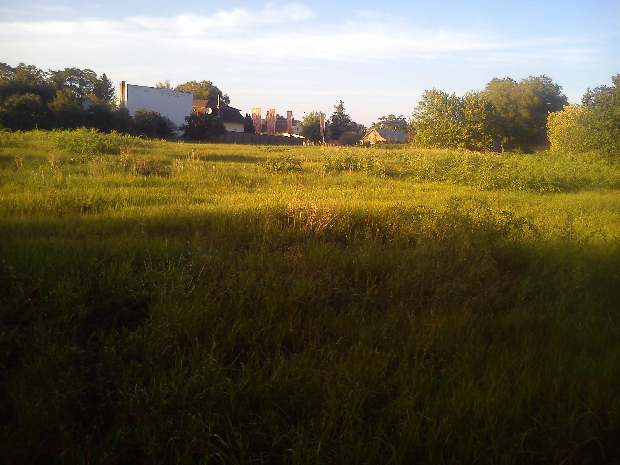 Bár elég rossz állapotban van, még megtalálhatóak a falak maradványai, egy árok, sőt egy ház(a falai álltak) is, bár szerintem az egy utólag hozzáépített rész.